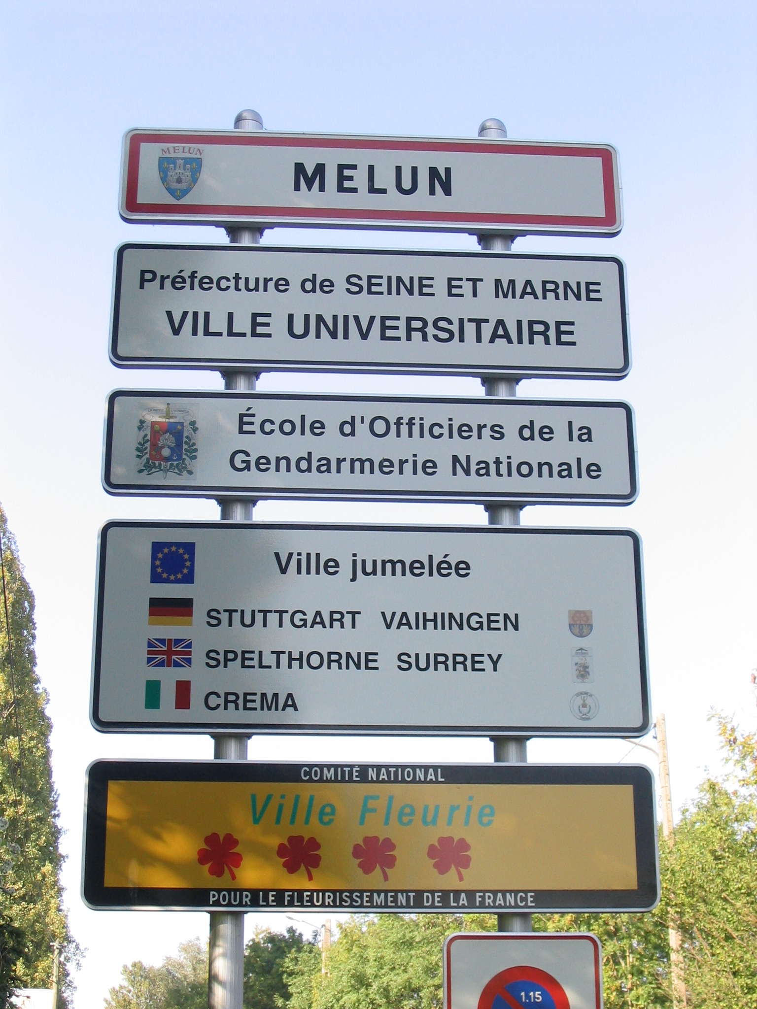 Panneau signalant l'entrée dans la ville de Melun.